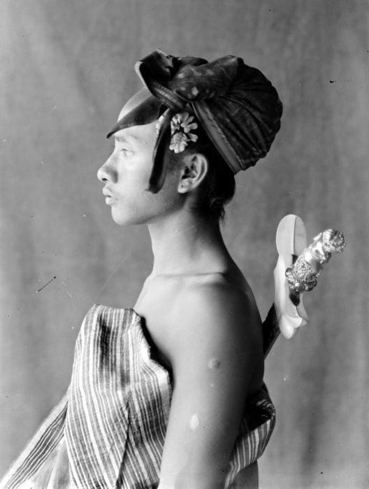 Negatief. Portret van een aanzienlijke man met kris op Bali